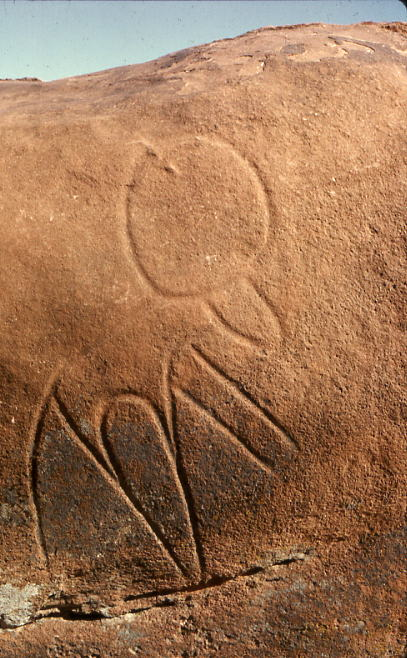 Gravure préhistorique de la région d'El Bayadh, Algérie